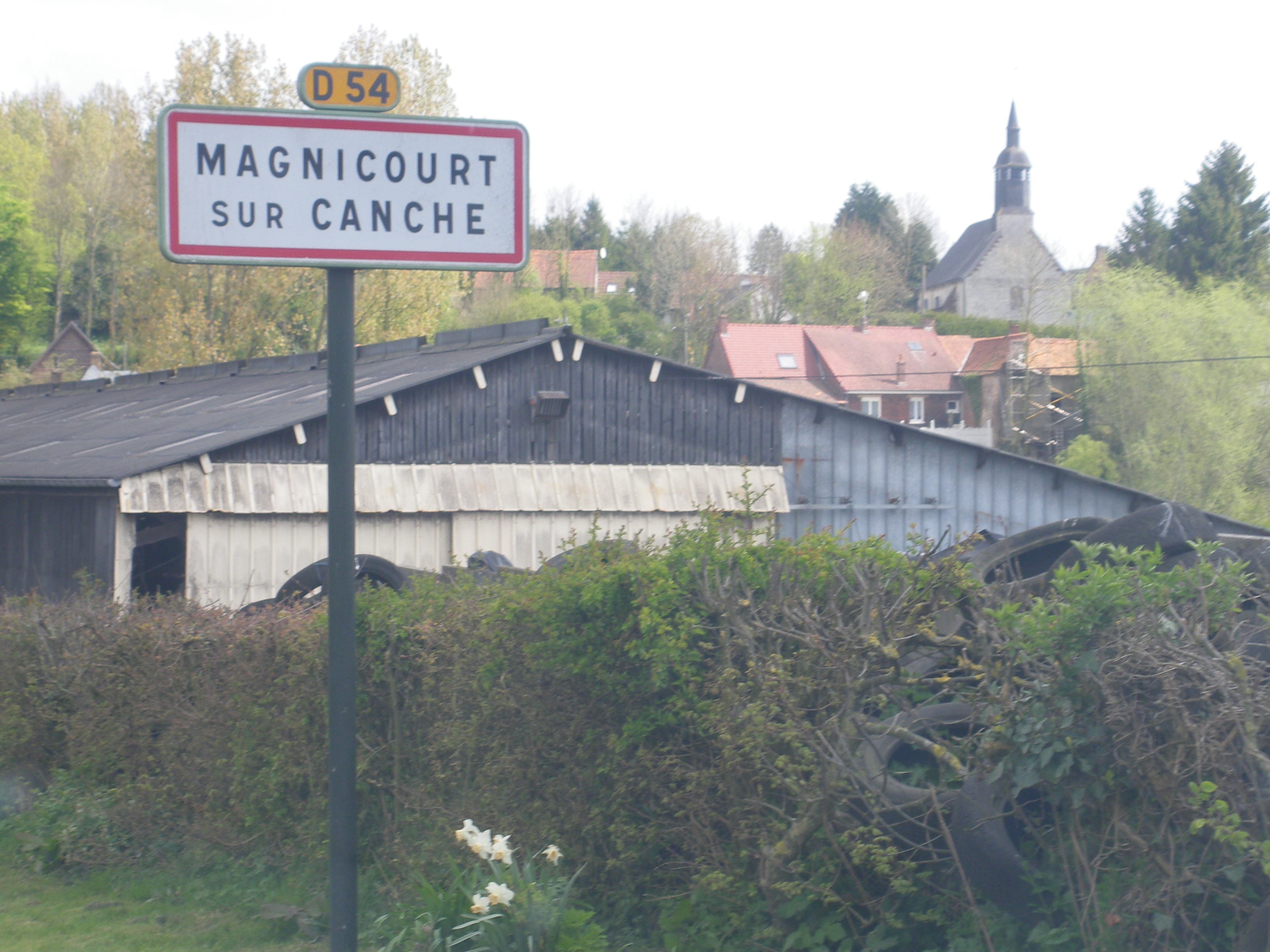 Vue de la commune de Magnicourt-sur-Canche.